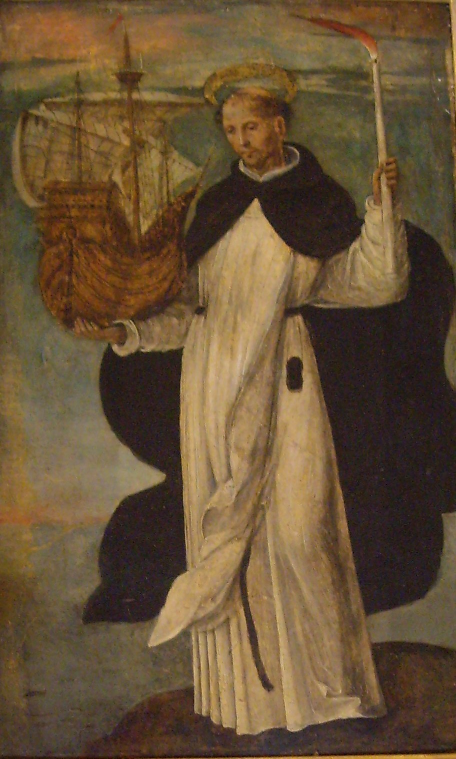 San Telmo o San Pedro González Telmo, patrón de los marineros. Esta representación corresponde a un retablo que se encuentra en el Alcázar de Sevilla.